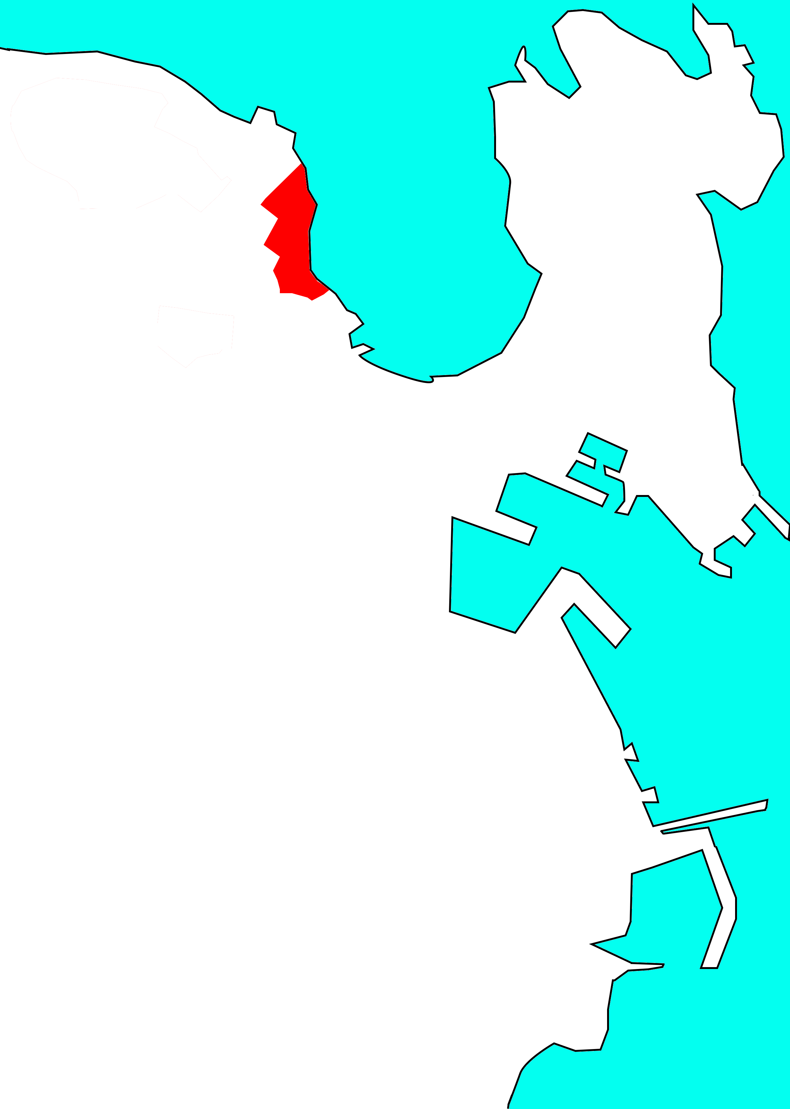 Situación de San Roque de Fóra no concello da Coruña.[1]